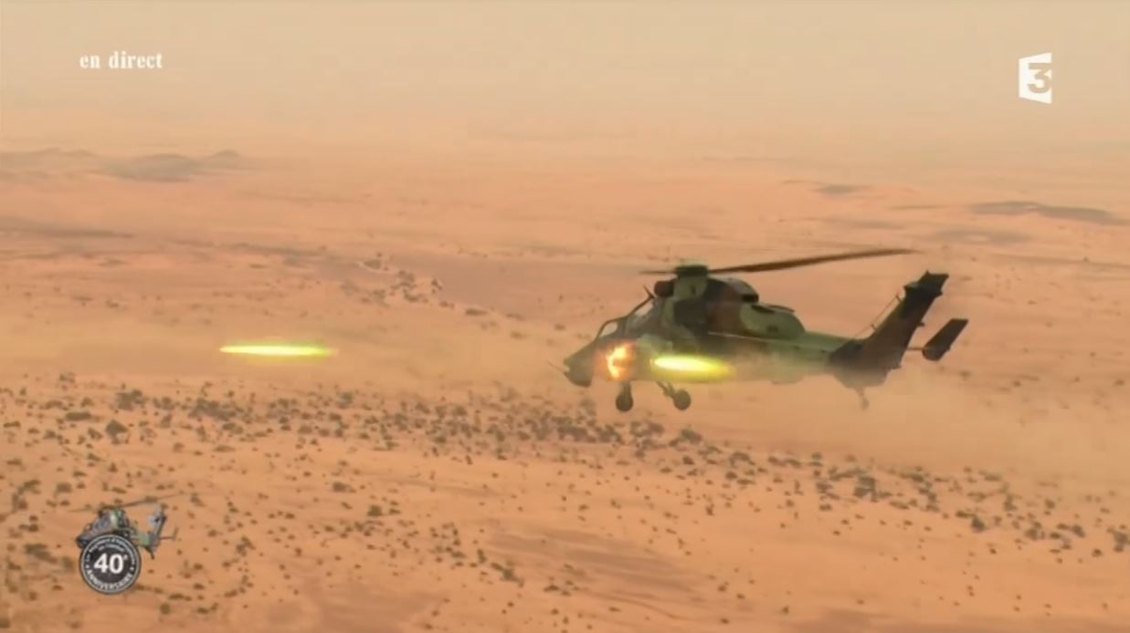 Tirs de roquettes de 68 mm depuis un hélicoptère Tigre de l'armée française au nord-est de Gao en 2017